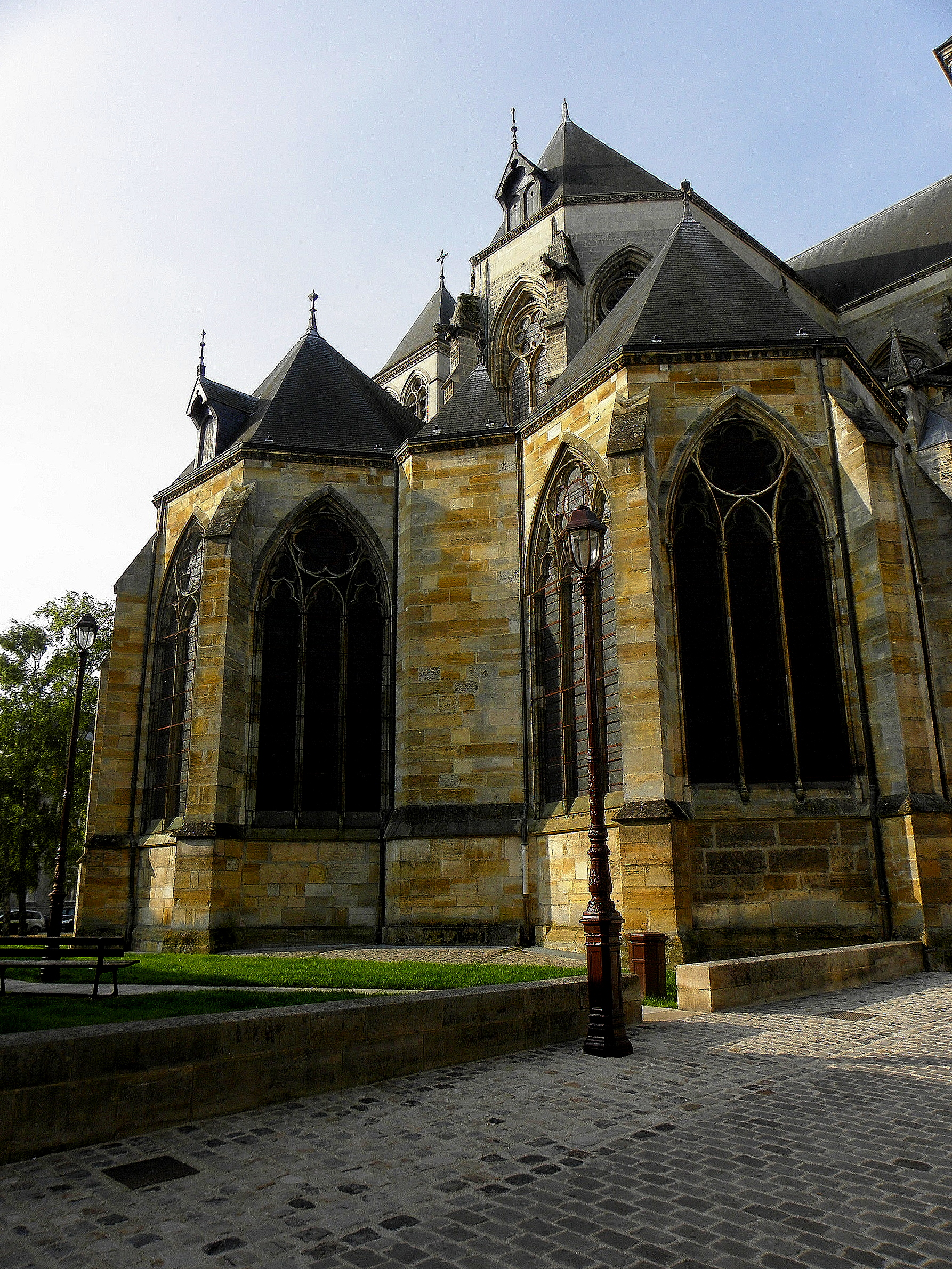 Chevet de la cathédrale Saint-Étienne de Châlons-en-Champagne (51).